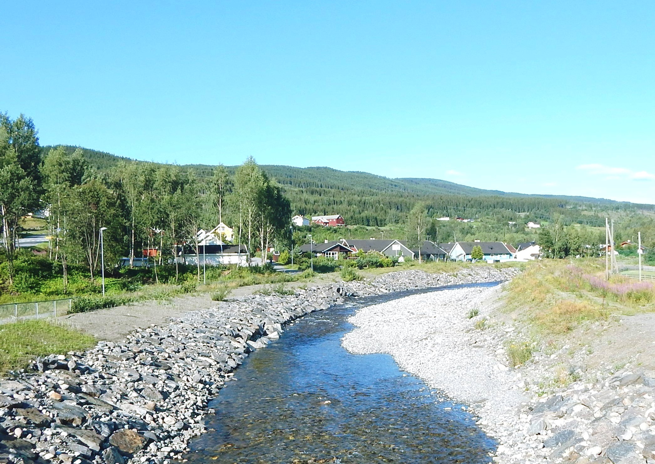 Rinna ved Vingrom